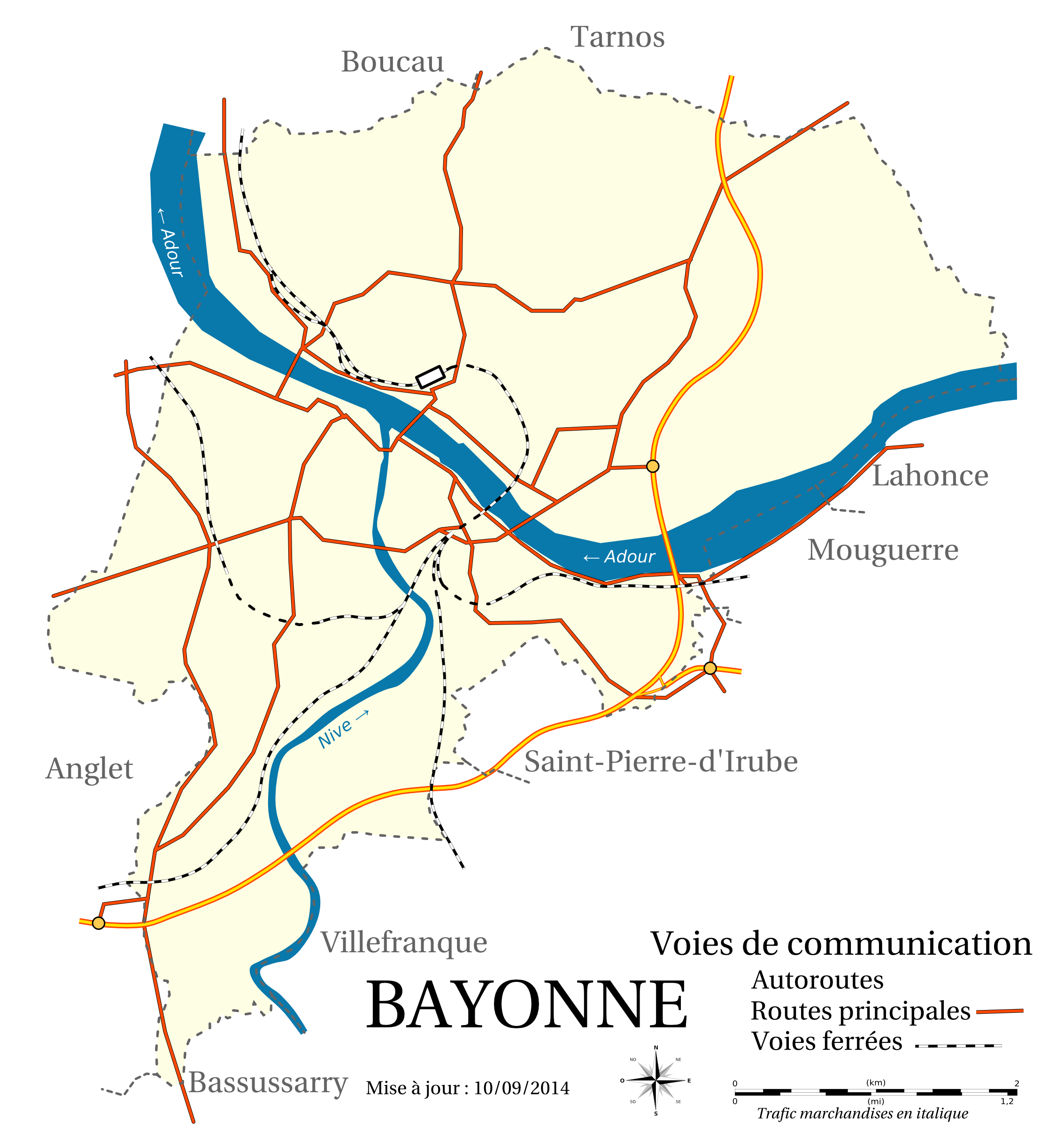 Carte de localisation des communes de Bayonne par rapport au territoire de celle-ci. Pour la carte vectorielle ayant servi à la réalisation de celle-ci : cf. File:Bayonne complete 10092014.svg.